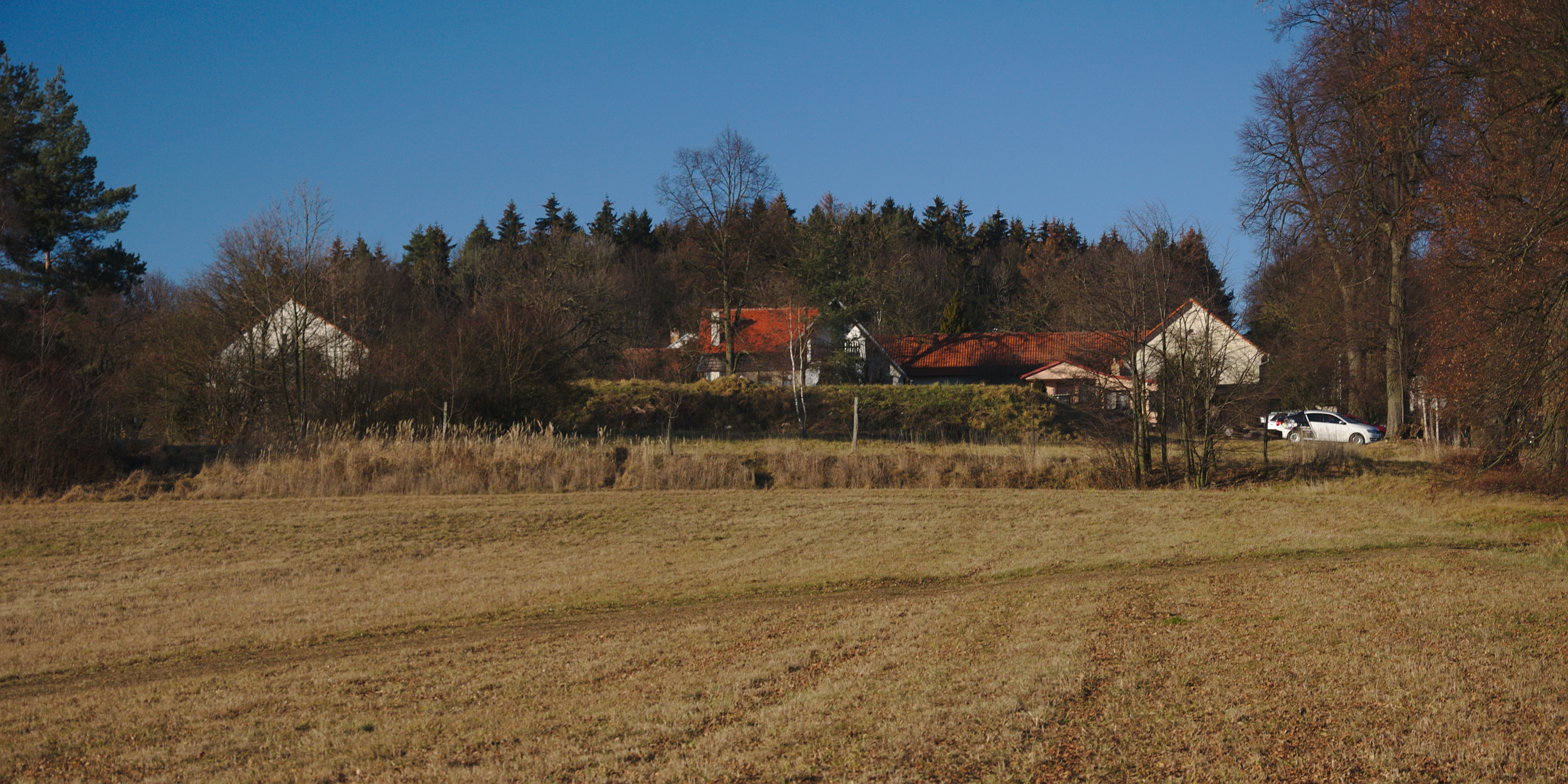 Pohled na osadu od jihu, Nové Dvory, Suchdol, Vavřinec, okres Blansko